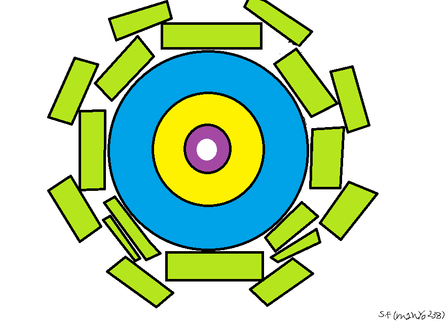 ATLASの断面図 ペイントで自作